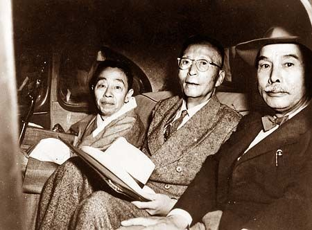 김규식, 서재필, 여운형